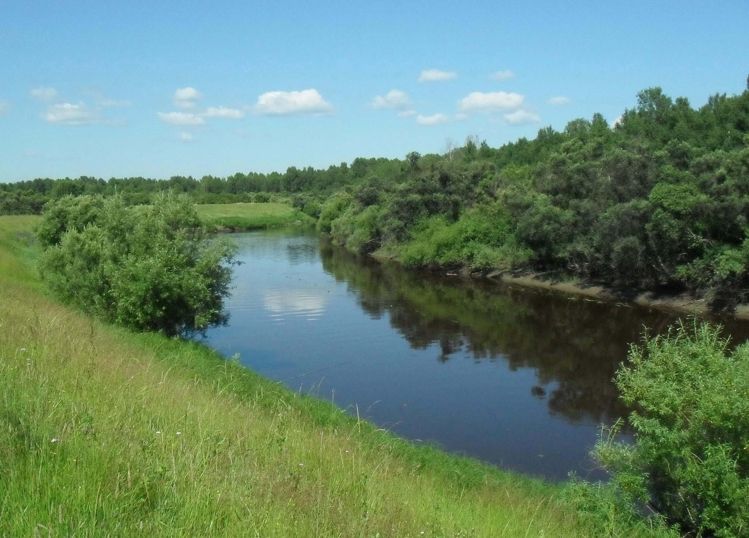 река Тартас в с. Гражданцево